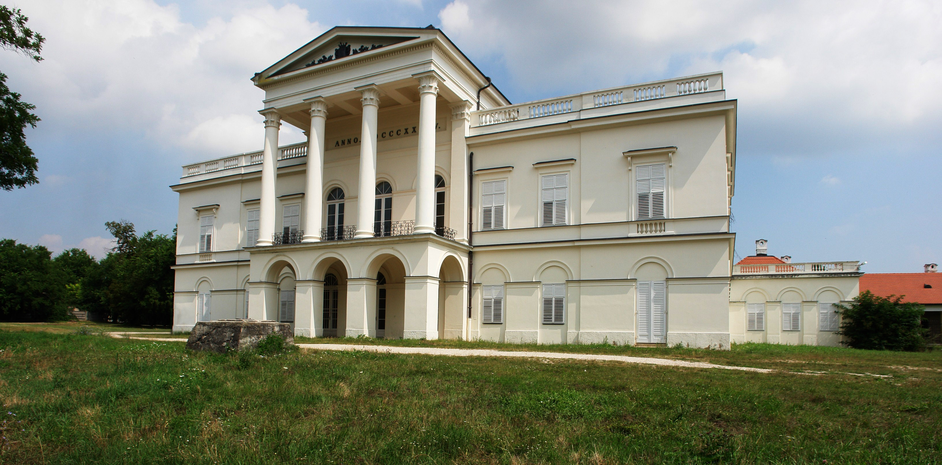 Sándor-Metternich-kastély This is a photo of a monument in Hungary. Identifier: 6110